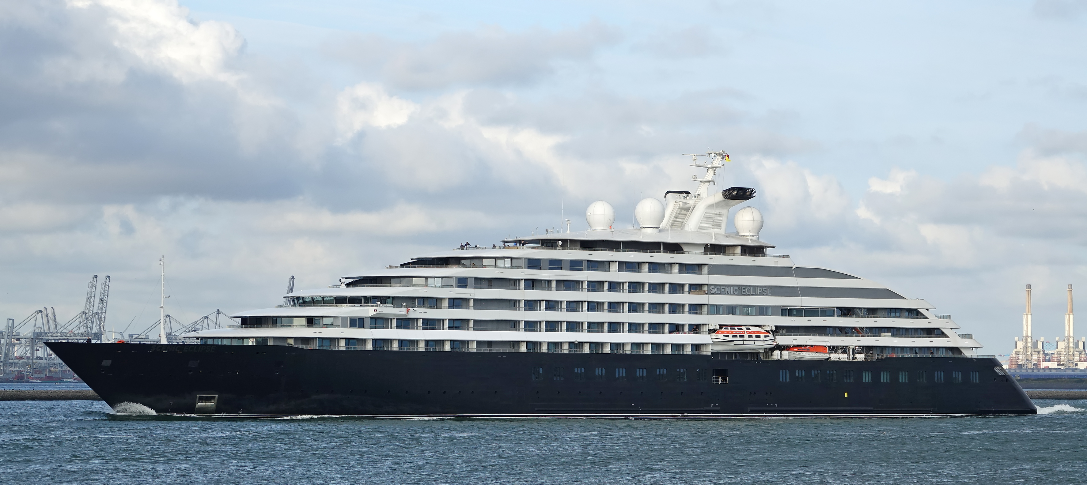 Hoek van Holland 8-8-2019